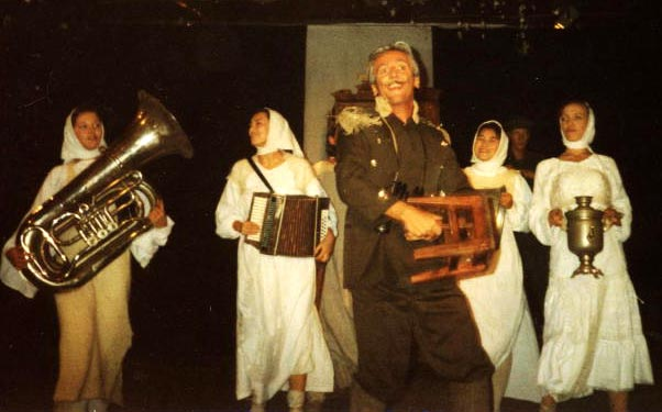 Бригадир в дипломном спектакле ГИТИСа "Амуры в снегу"